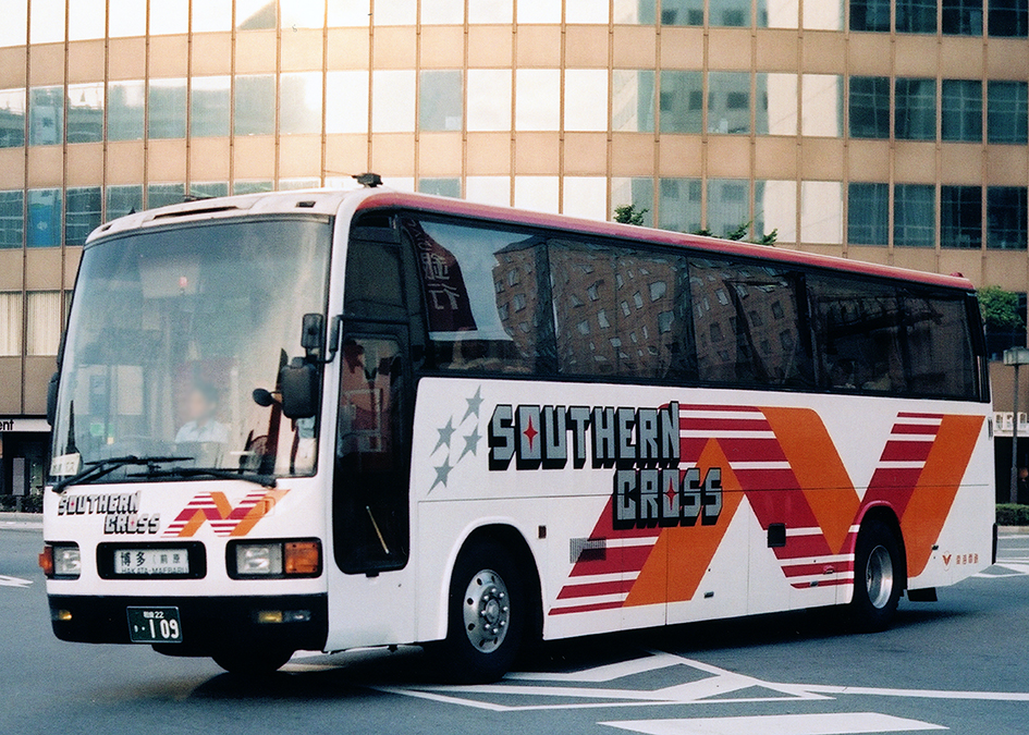 南海電鉄 サザンクロス博多号 三菱ふそう・エアロクィーンM P-MS729S